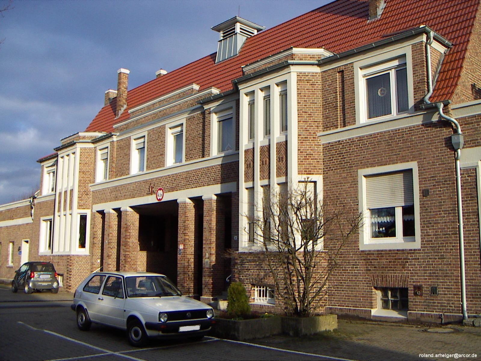 Altes Feuerwehrhaus in Nordwalde (Kreis Steinfurt)